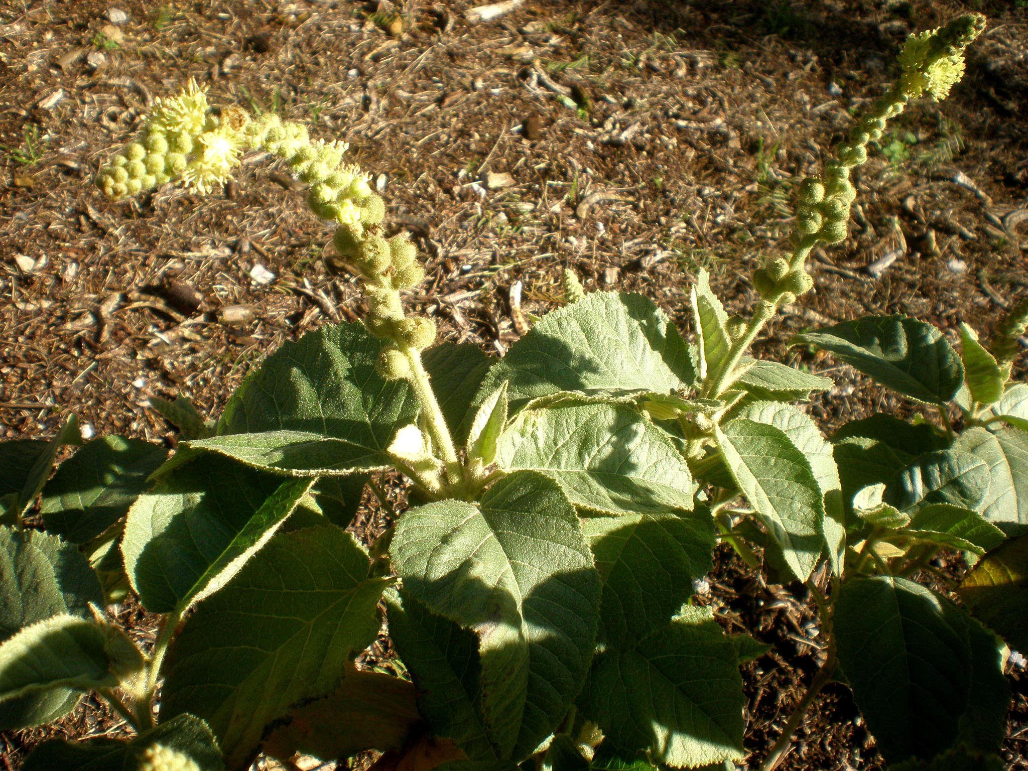 Jardín Botánico de Barcelona.